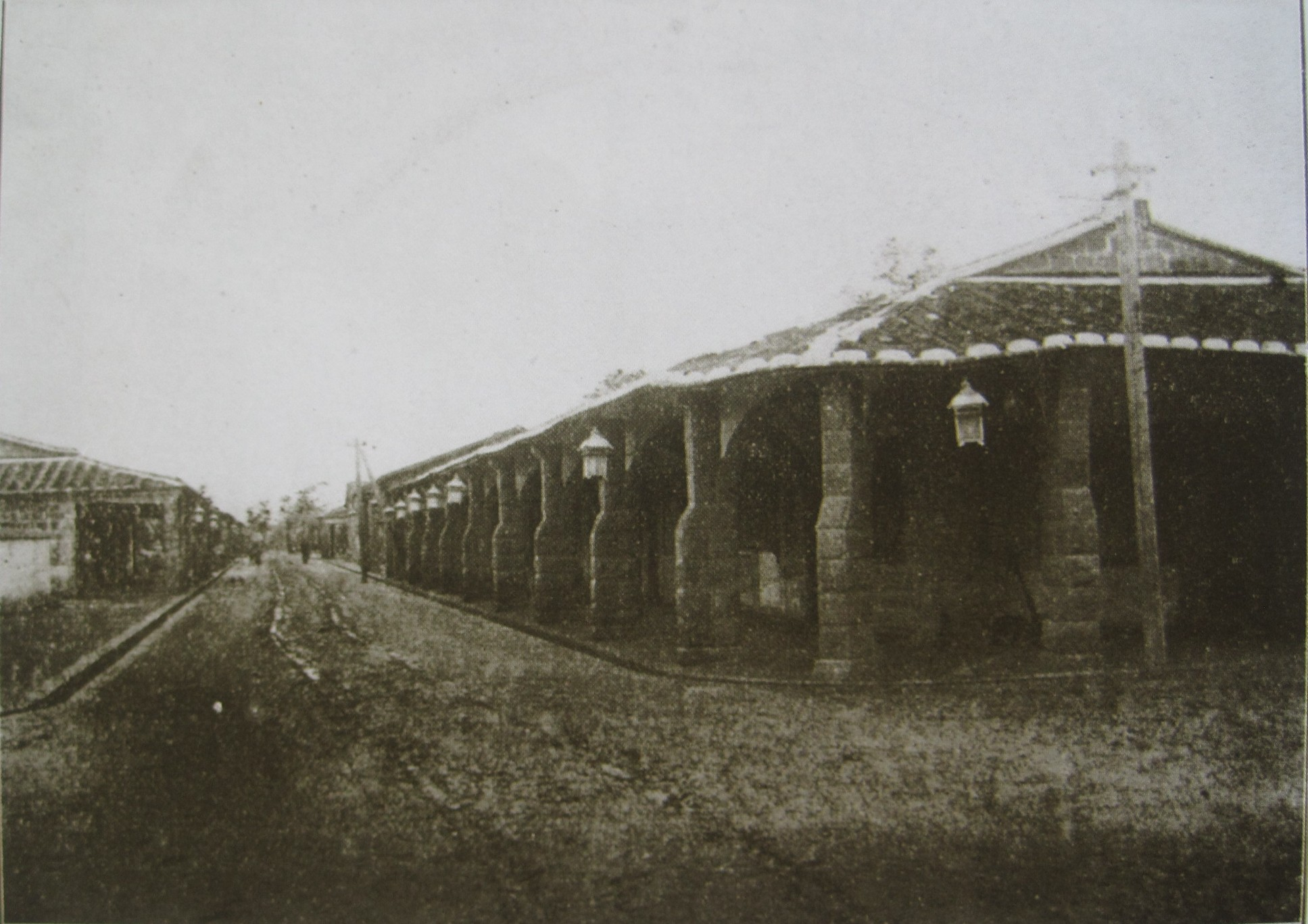 蕃薯寮廳街景